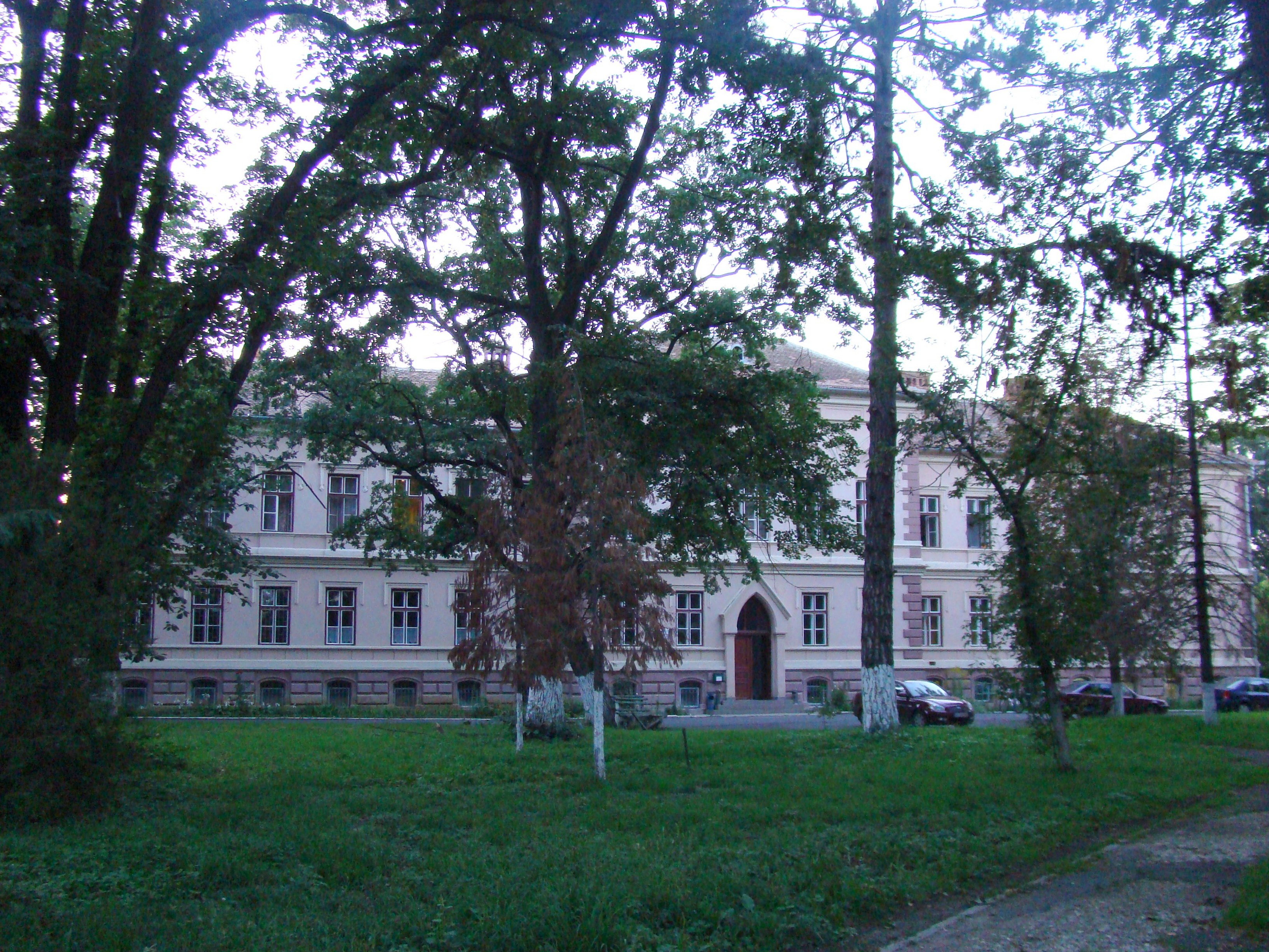 Ansamblul fostului seminar evanghelic din Sibiu (Corpul C) 03